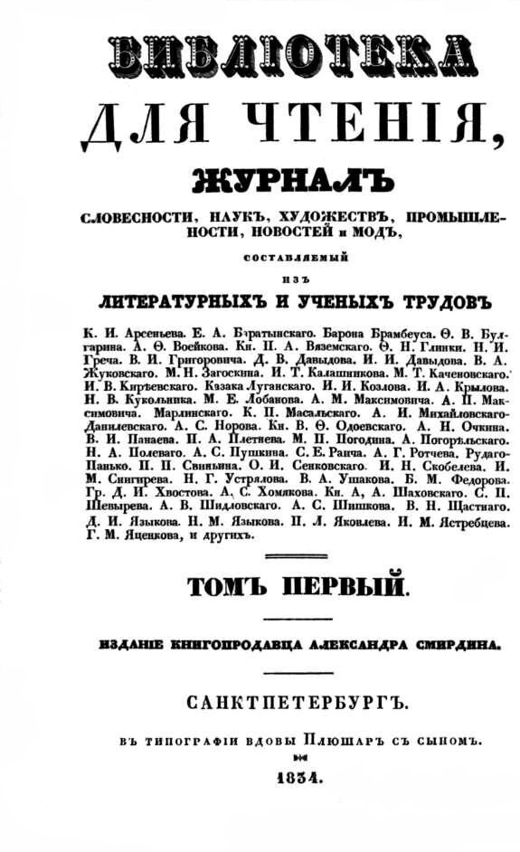 Обложка журнала «Библиотека для чтения»